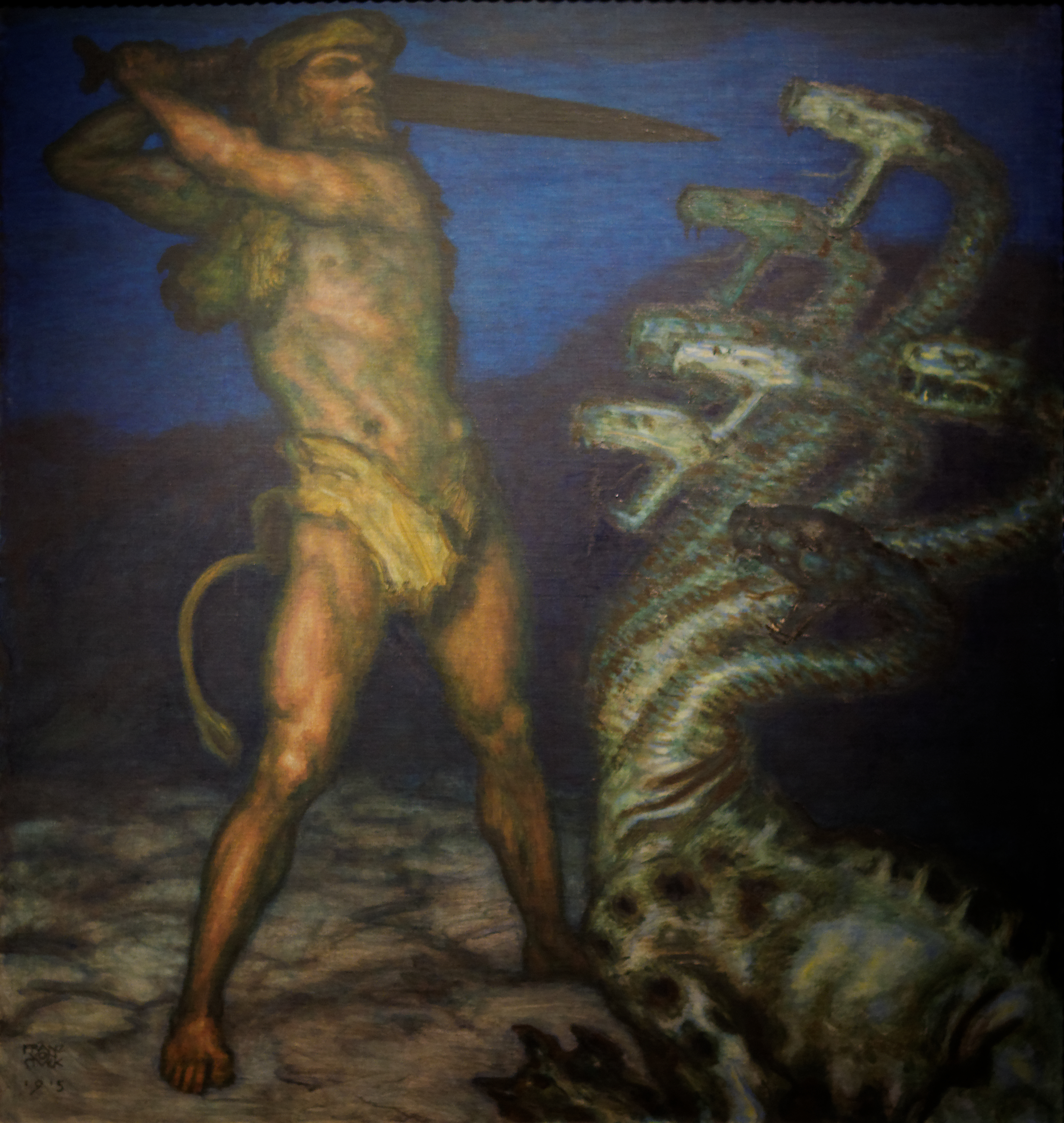 Hercules et l'Hydre de Lerne, Franz von Stuck (1915). Exposé au musée de la Villa Stuck, Munich